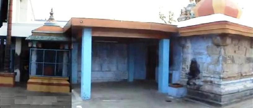 കൊടുമ്പ് ശിവക്ഷേത്രം